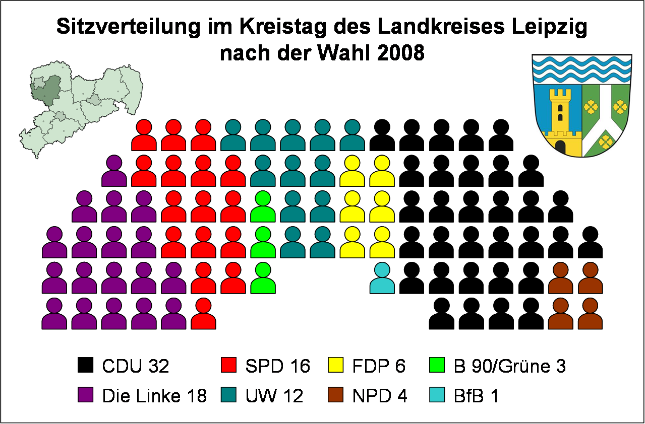 Sitzverteilung im Kreistag des Landkreises Leipzig nach der Wahl vom 8. Juni 2008